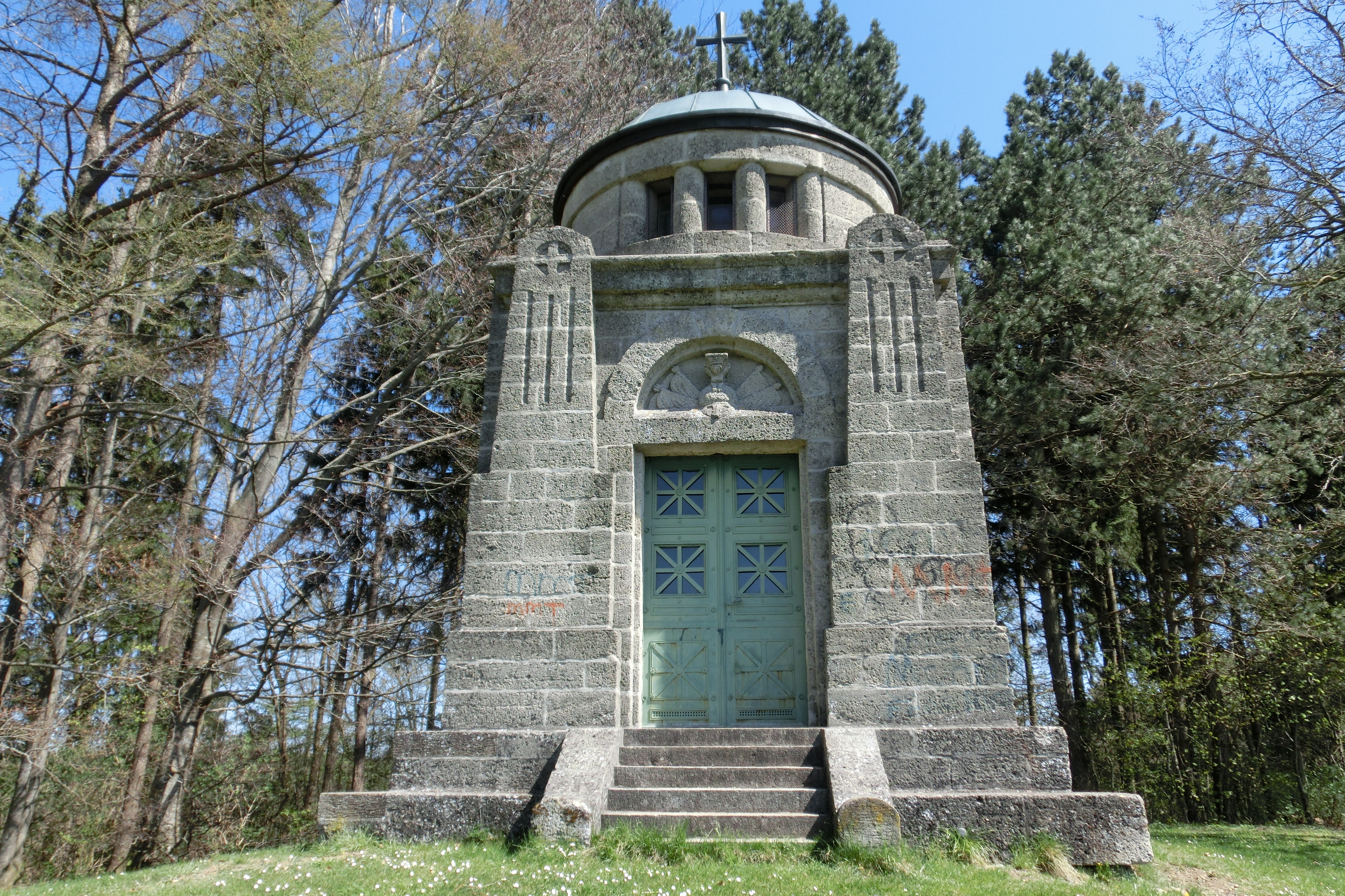 Deutschland - Baden-Württemberg - Landkreis Sigmaringen - Ostrach: Denkmal/Gedenkkapelle auf dem Burchbühl; zur Erinnerung an die Schlacht bei Ostrach am 21. März 1799